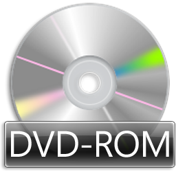 Logo simple DVD-ROM